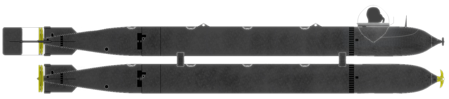 Bemannter Ein-Mann Torpedo Neger